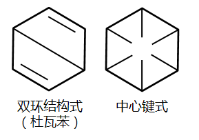 双环结构式（杜瓦苯）&中心键式